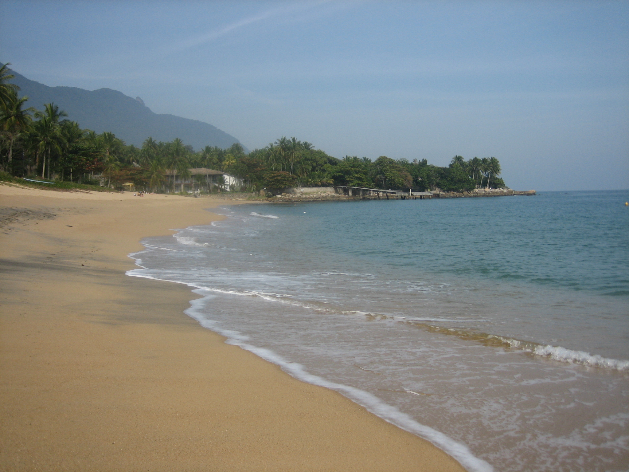 Praia da Feiticeira, Ilha Bela.